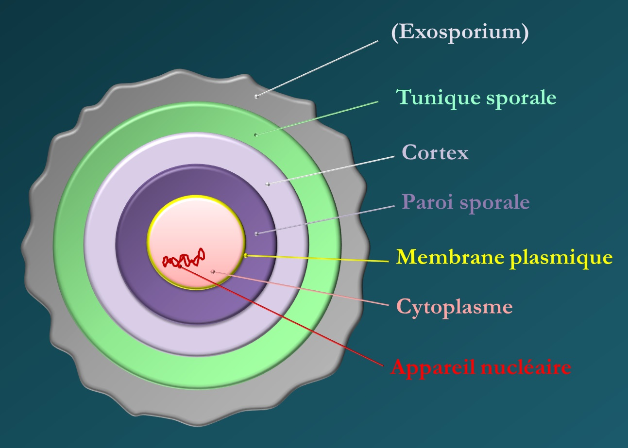 Composition d'une spore bactérienne.